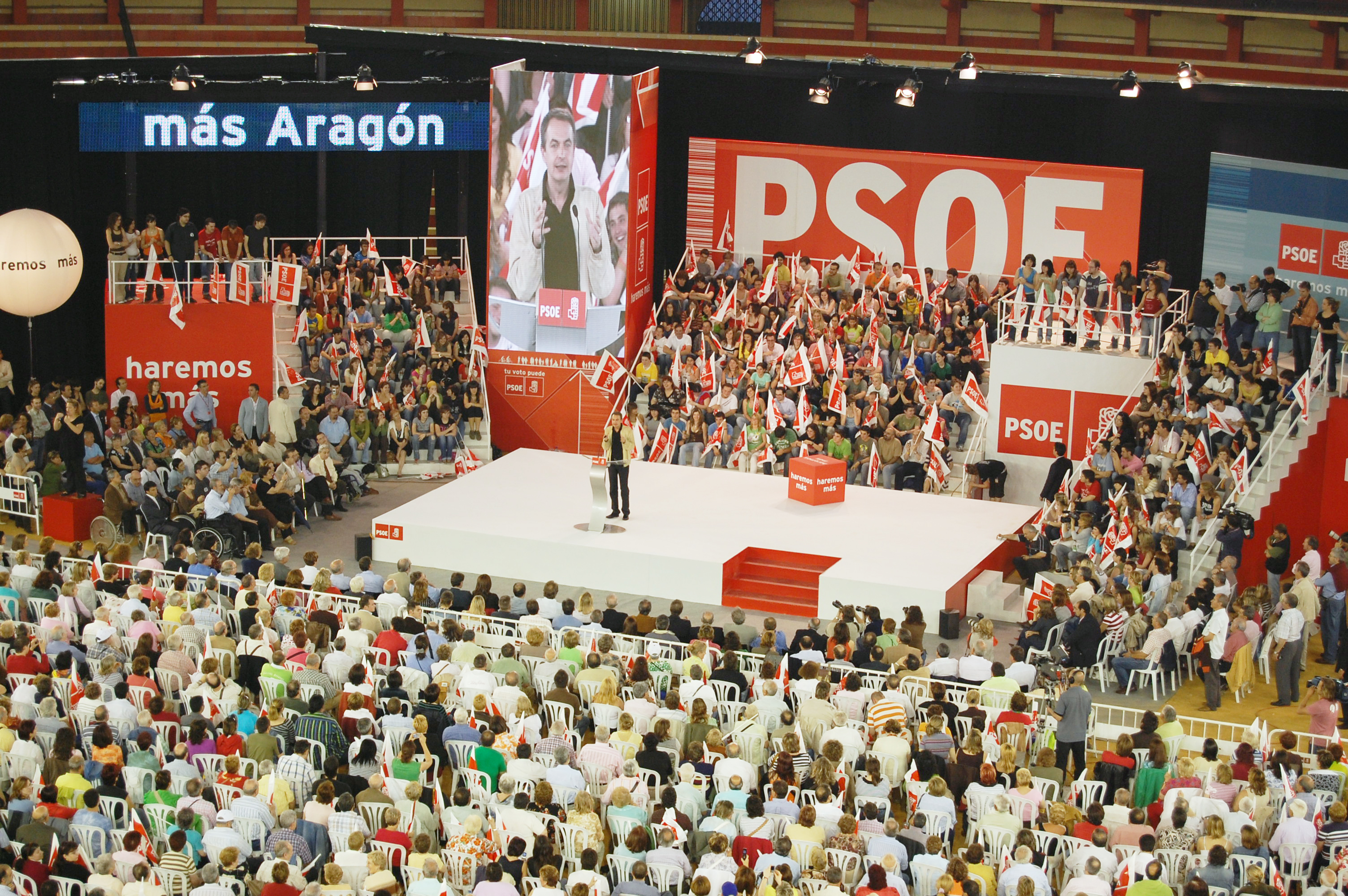 Monólogo presidencial - Zapatero